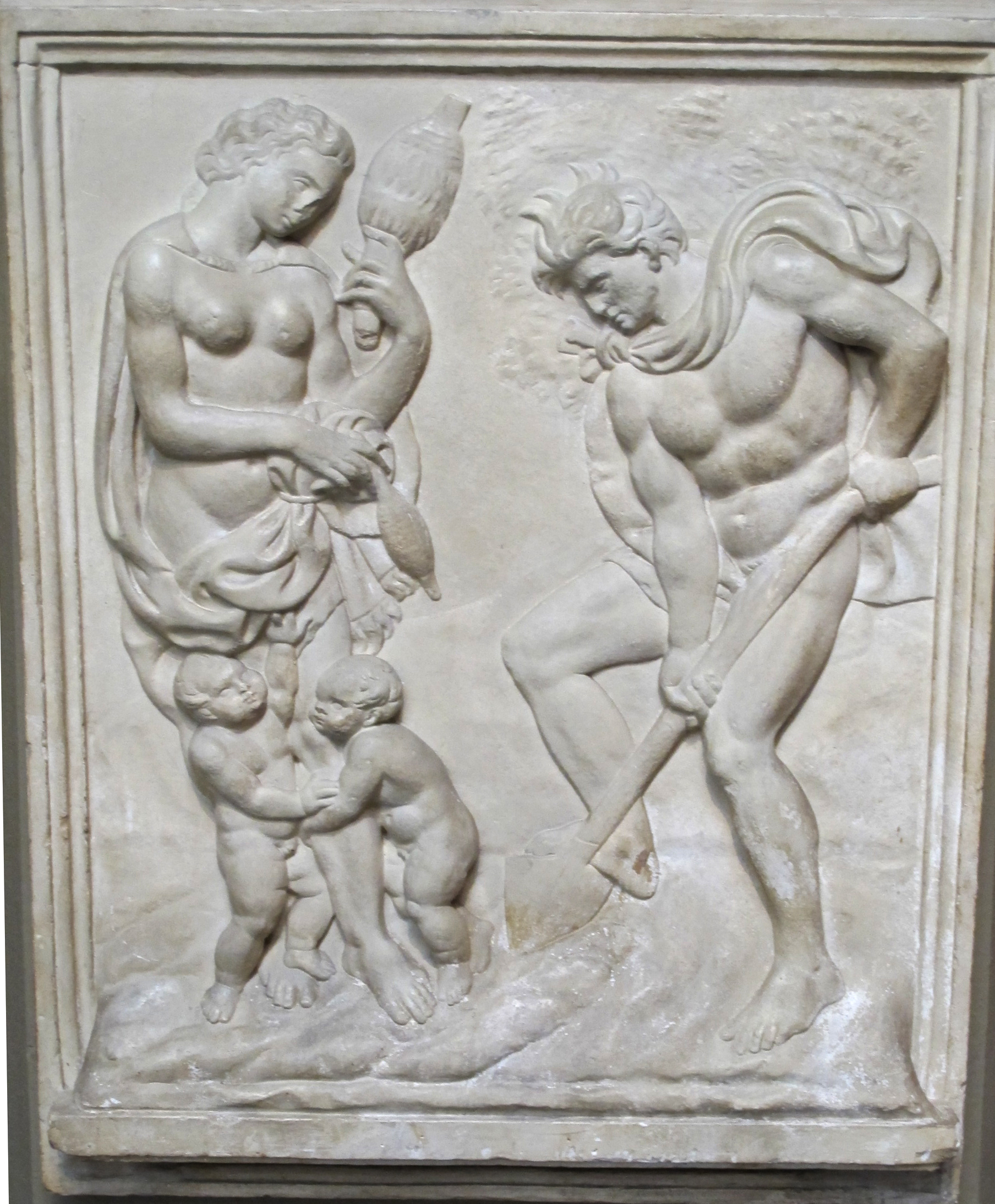 Museo pushkin, calchi, jacopo della quercia, formnelle del portale di bologna